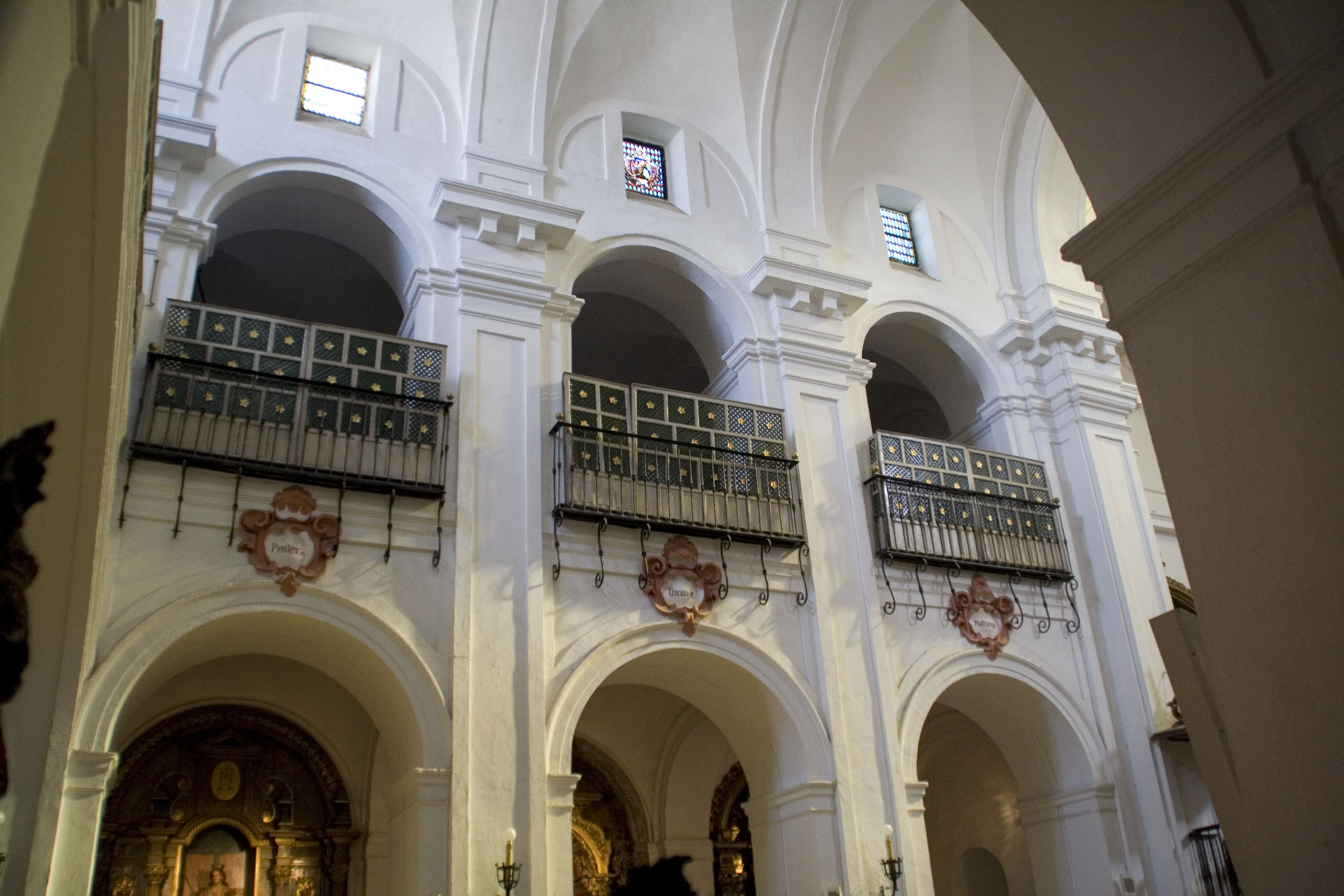 Nave del Evangelio - Iglesia de Santa Cruz